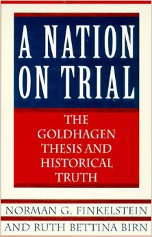 Ruth Bettina Birn, Norman G. Finkelstein A Nation on Trial 1998 cover